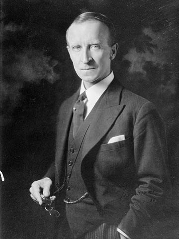 Φωτογραφία του Τζων Μπιούκαν (26/08/1875 - 11/02/1940). Σκώτος νοβελίστας, 1ος Βαρόνος του Τουήντσμουιρ και 15ος Γενικός Κυβερνήτης του Καναδά. A photo of John Buchan (26/08/1875 - 11/02/1940). Scotish novelist, 1st Baron of Tweedsmuir and 15th General Governor of Canada.